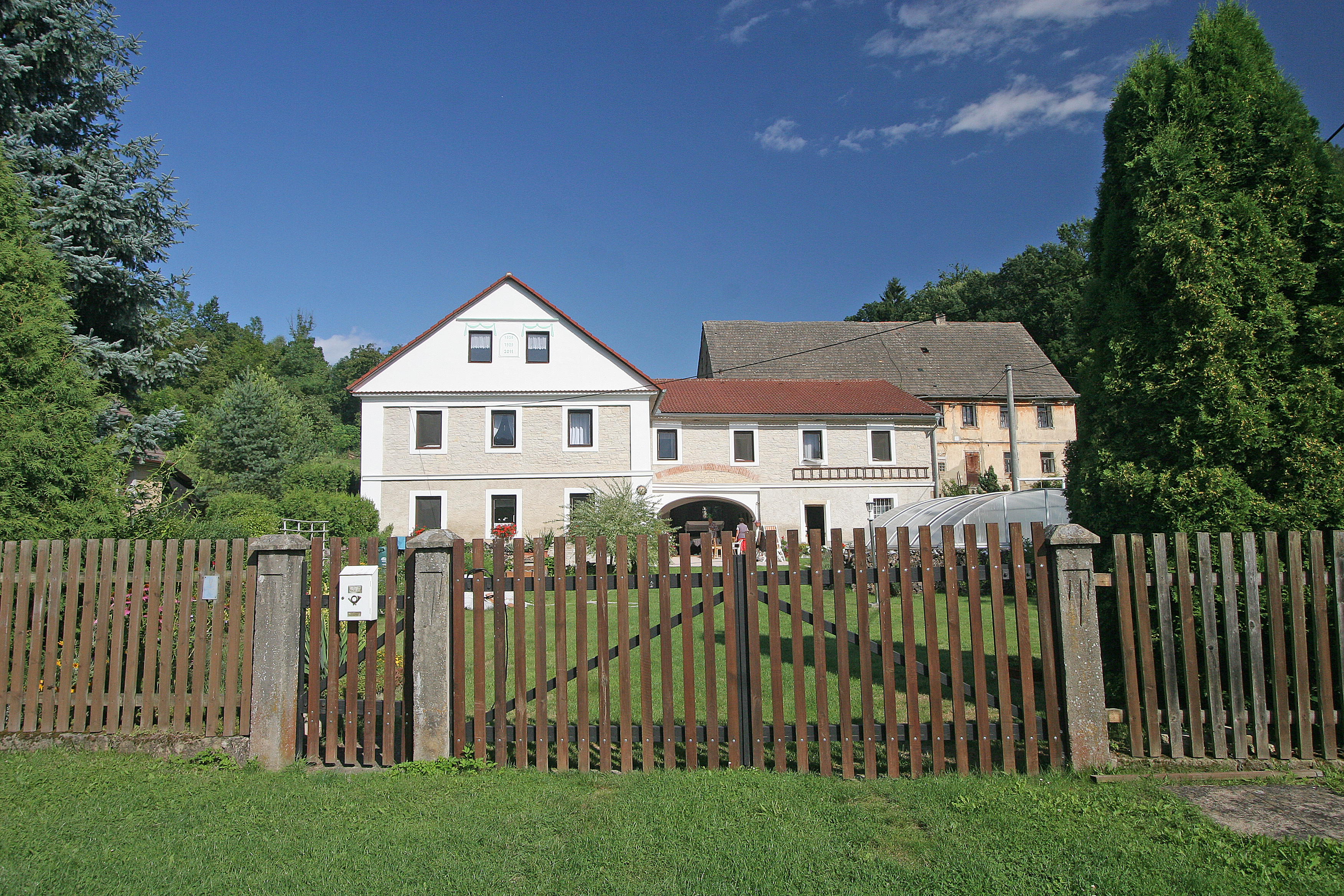 Rochov čp. 36